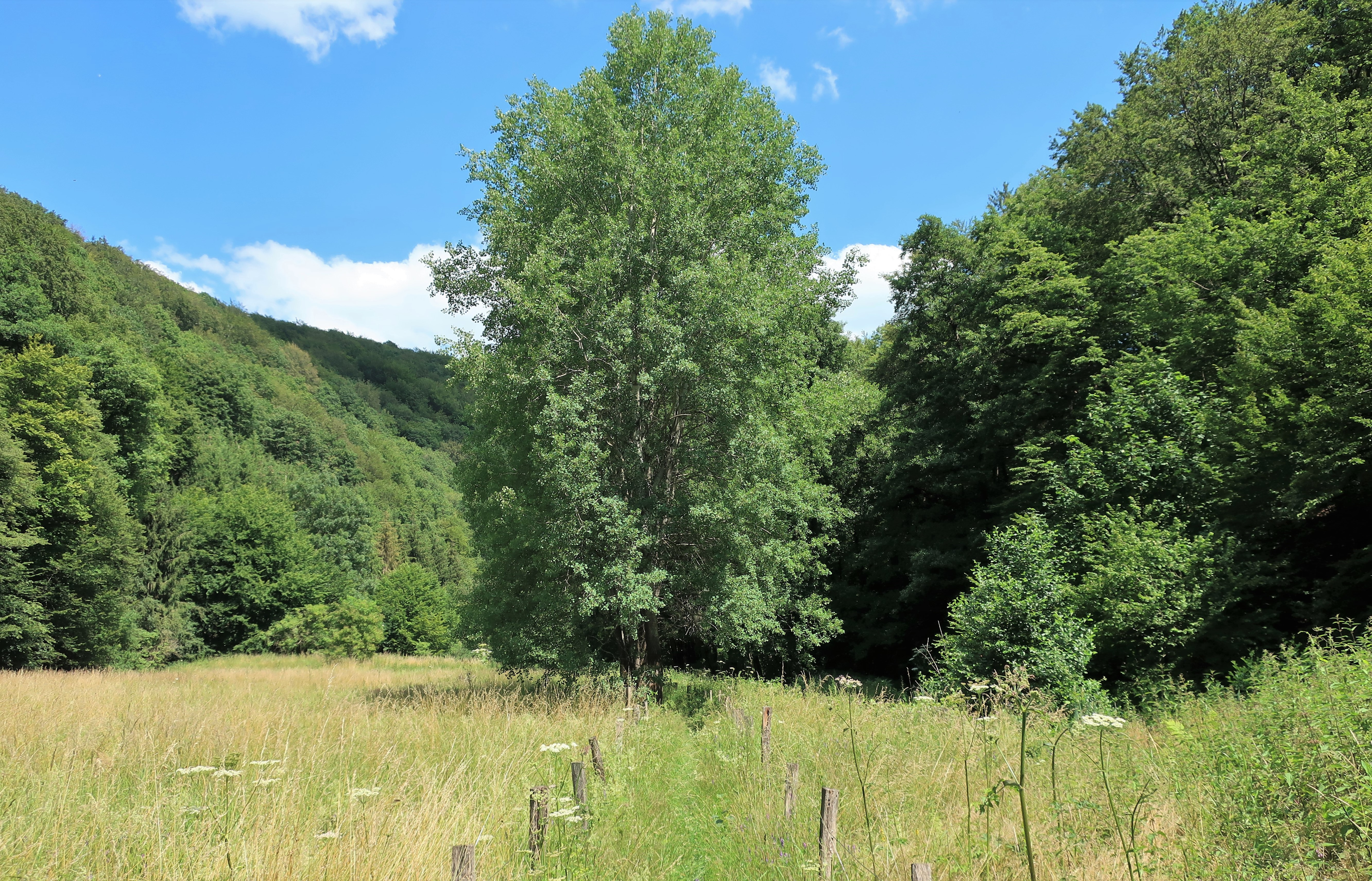 Geschützter Landschaftsbestandteil 1.4.2.90 „Sterbecker Aue“ in Hagen, östlich von Rummenohl zwischen Unter Langscheid und Rölveder Straße. Es handelt sich um Flächen mit Auwaldbeständen und Brachen entlang der Sterbecke sowie einer gehölzbestandenen Bachtalböschung.